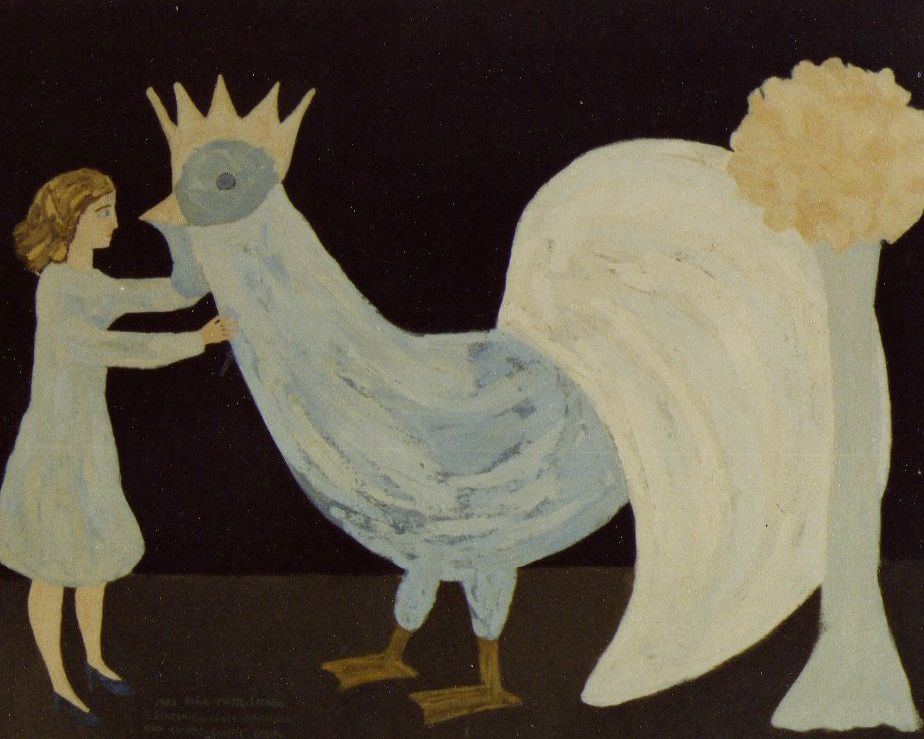 1978 oleo sobre tela